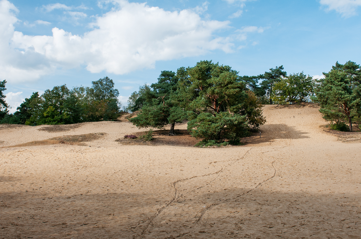 Zicht op de Oudsberg